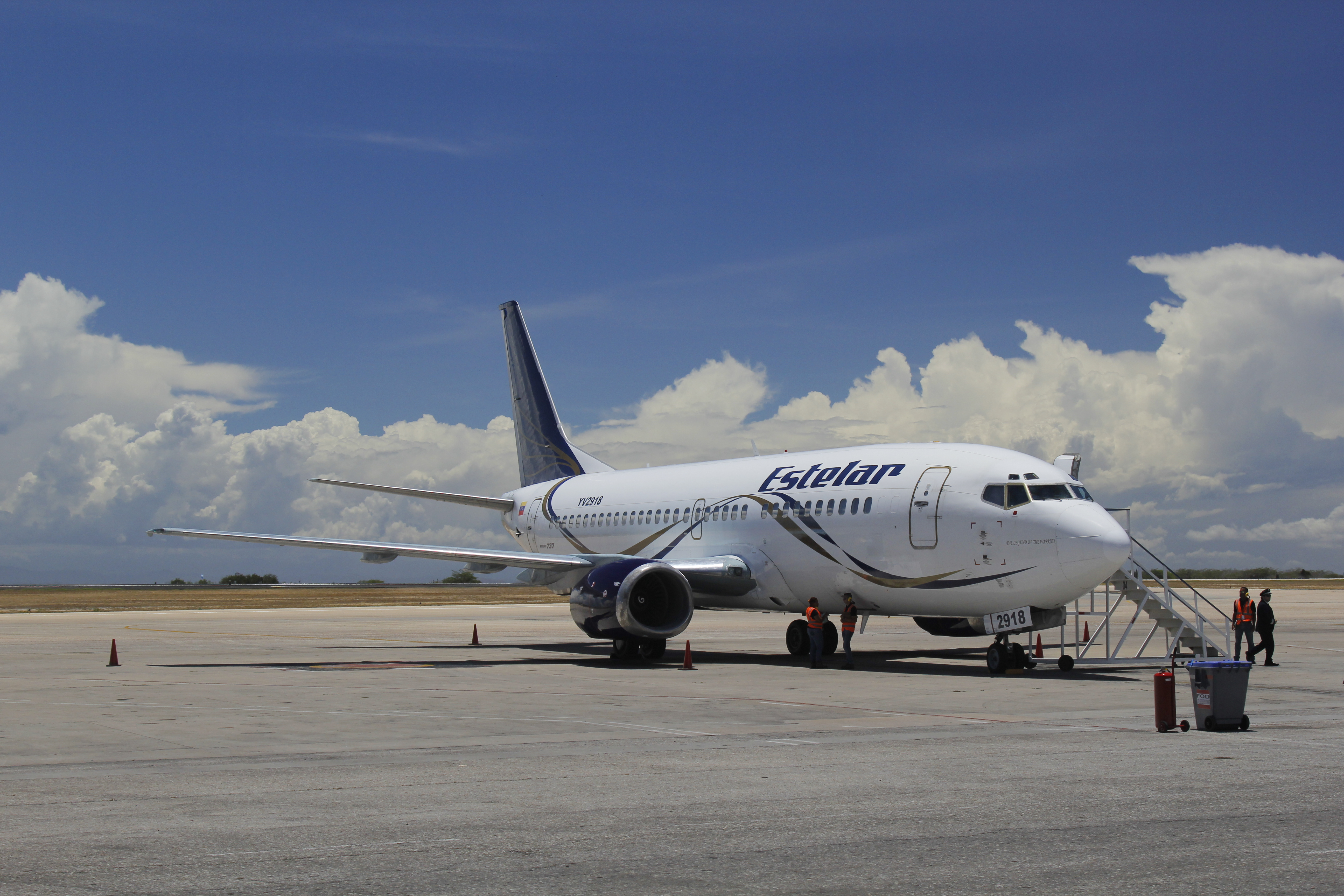 Boeing 737-300